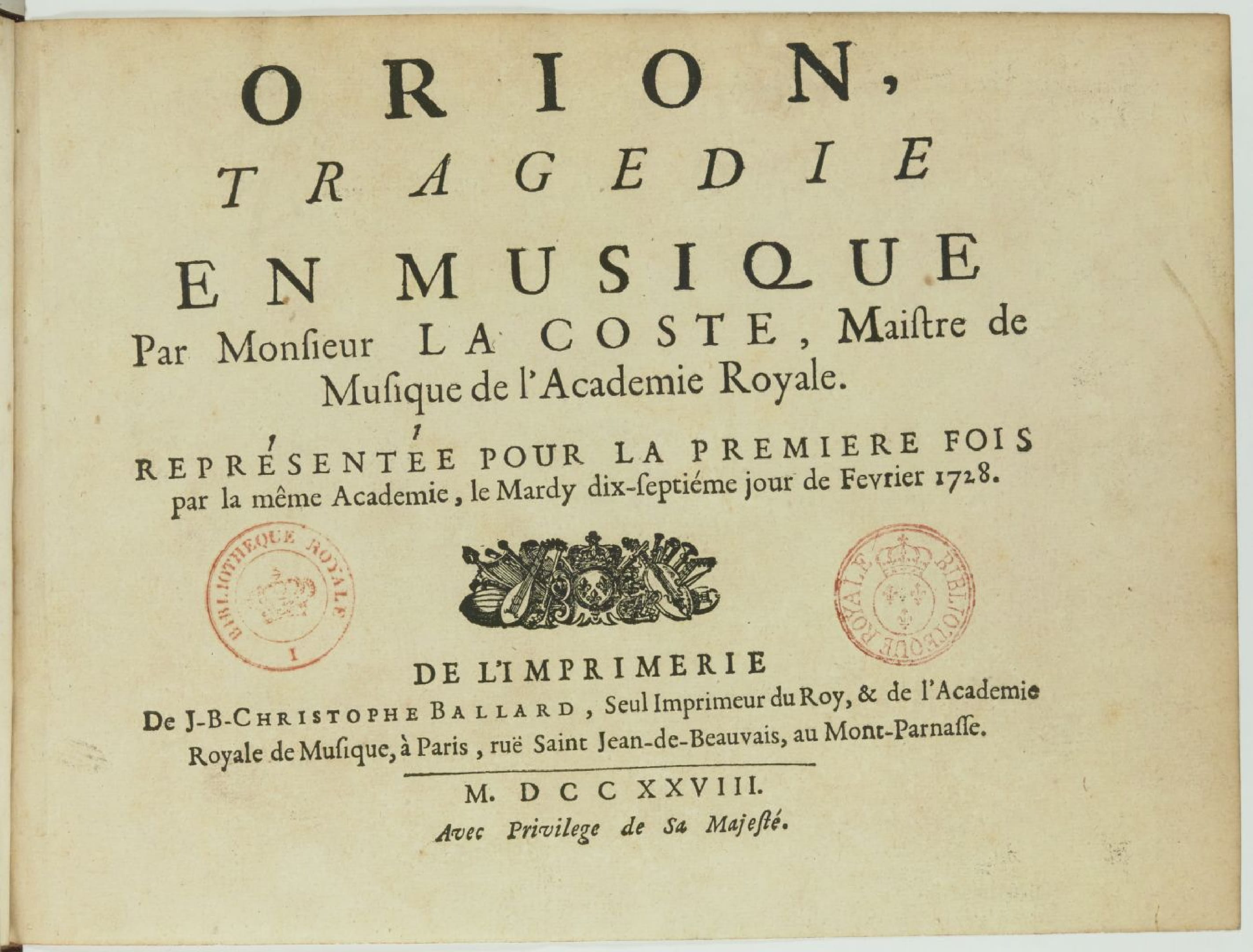 Page de titre de la partition réduite de l'opéra Orion de Louis de La Coste.